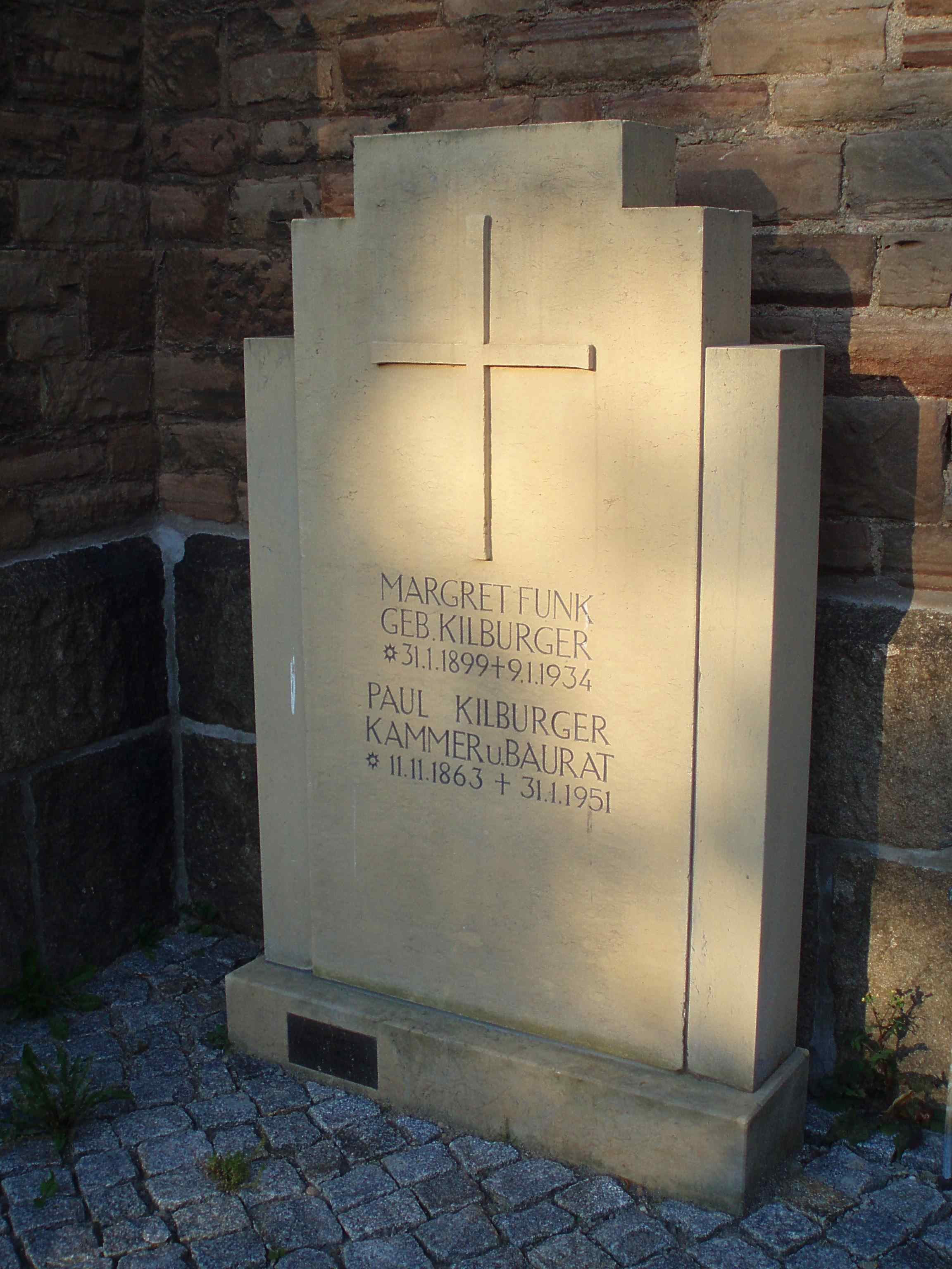 Gedenkstein für Paul Kilburger